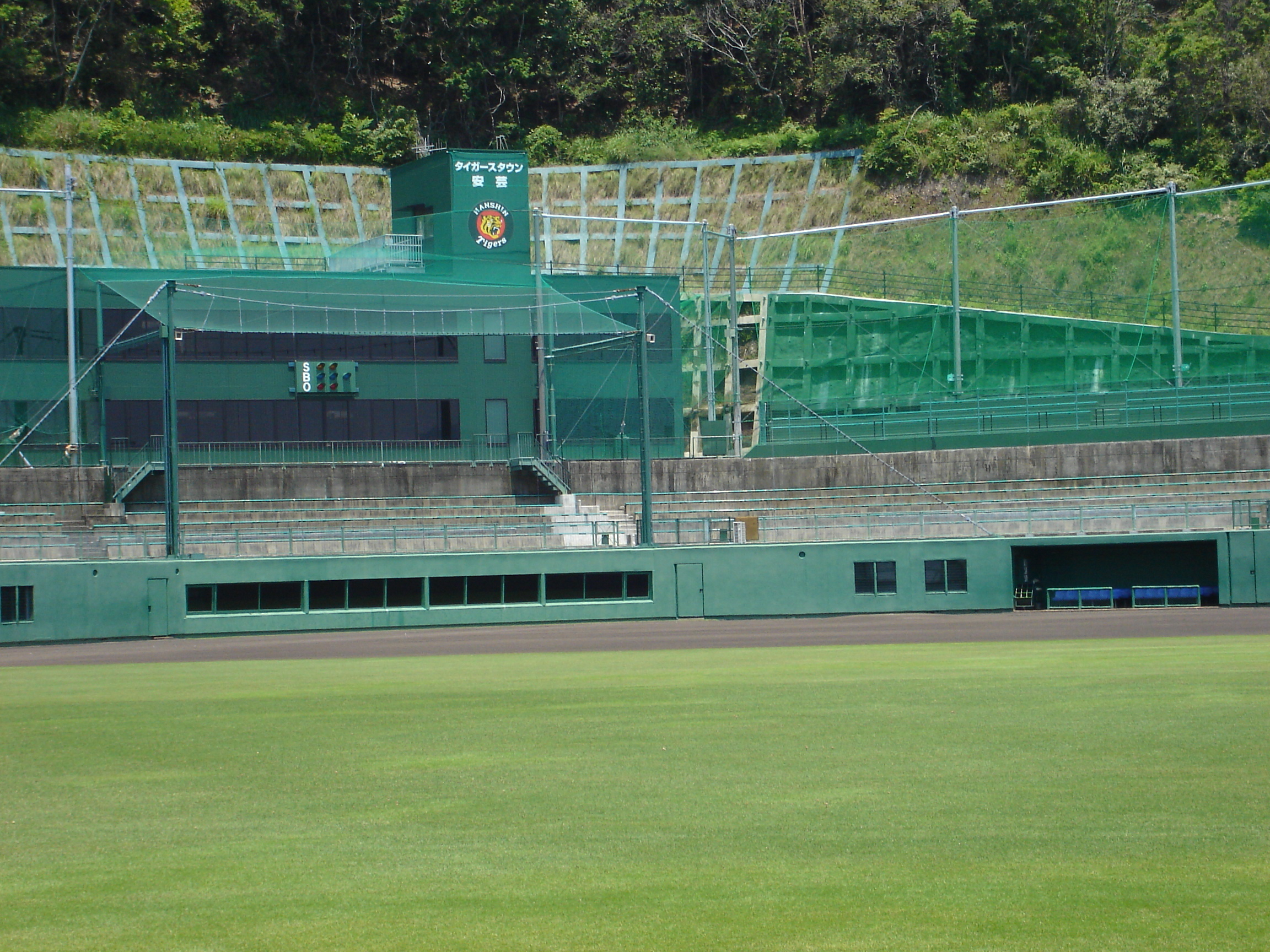 安芸市営球場。 - 日本国高知県安芸市にある競技場。